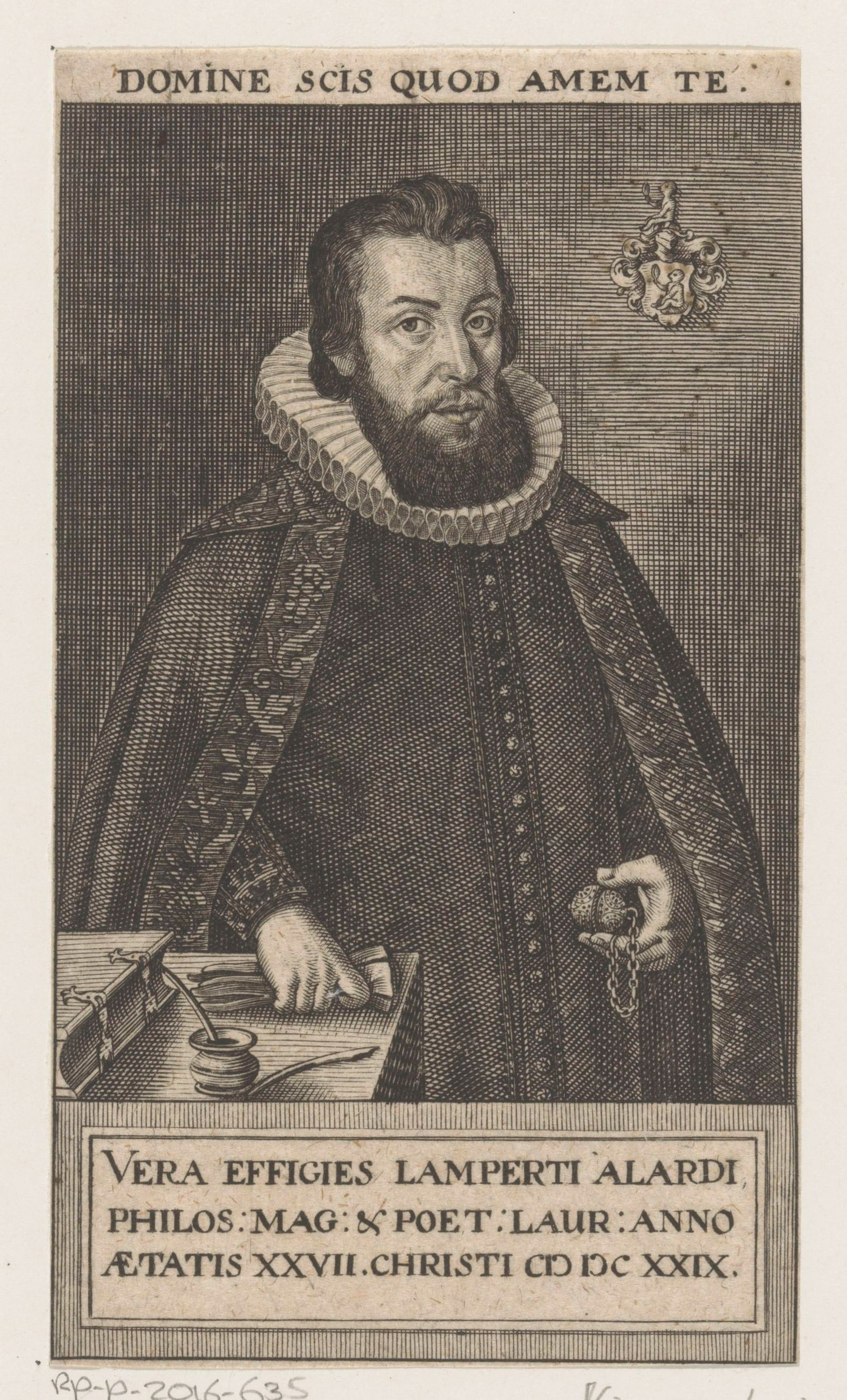 IdentificatieTitel(s): Portret van Lambert Alard op 27-jarige leeftijdObjecttype: prent Objectnummer: RP-P-2016-635Omschrijving: Portret van Lambert Alard. Hij staat naast een tafel met daarop een boek en schrijfgerei. Rechtsboven een wapen. In de bovenmarge een regel Latijnse tekst. In een kader zijn naam, zijn beroepen en zijn leeftijd.VervaardigingVervaardiger: prentmaker: anoniemDatering: 1629Fysieke kenmerken: gravureMateriaal: papier Techniek: graveren (drukprocedé)Afmetingen: blad: h 137 mm (binnen plaatrand afgesneden) × b 78 mm (binnen plaatrand afgesneden)OnderwerpWie: Lambert AlardVerwerving en rechtenVerwerving: onbekend 2016Copyright: Publiek domein